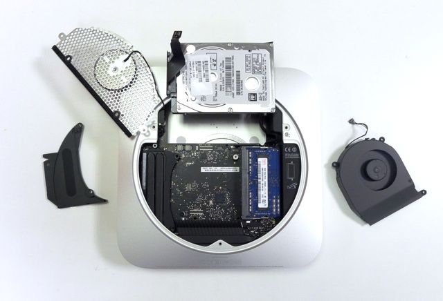 mac mini upgrade